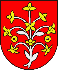 Герб с. Цейков: герб села